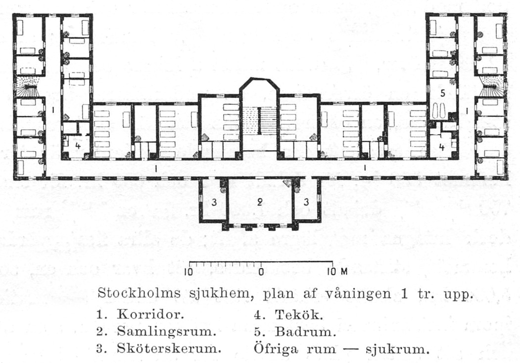 Stockholms sjukhem, planritning, bottenvåning